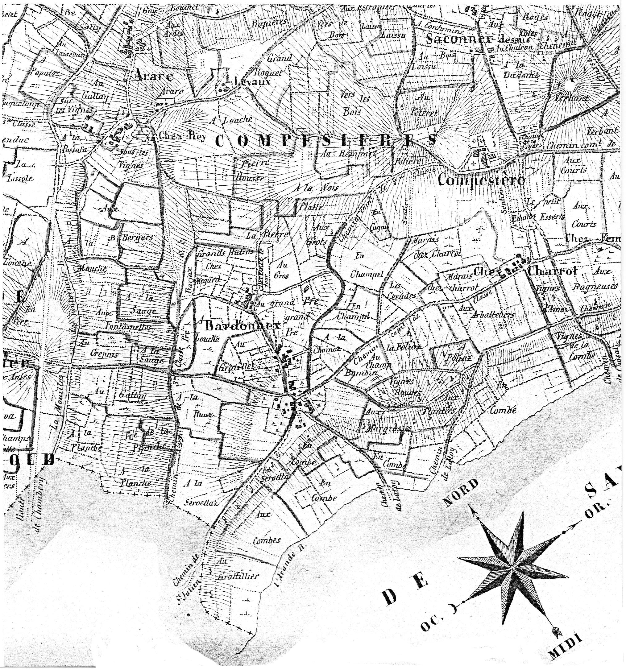 L'ancienne commune de Compesières dans le canton de Genève, détail de la carte « Mayer » de 1830